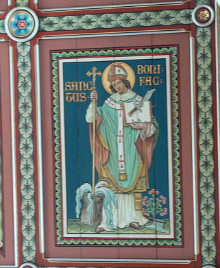 Spätnazarenisches Deckengemälde